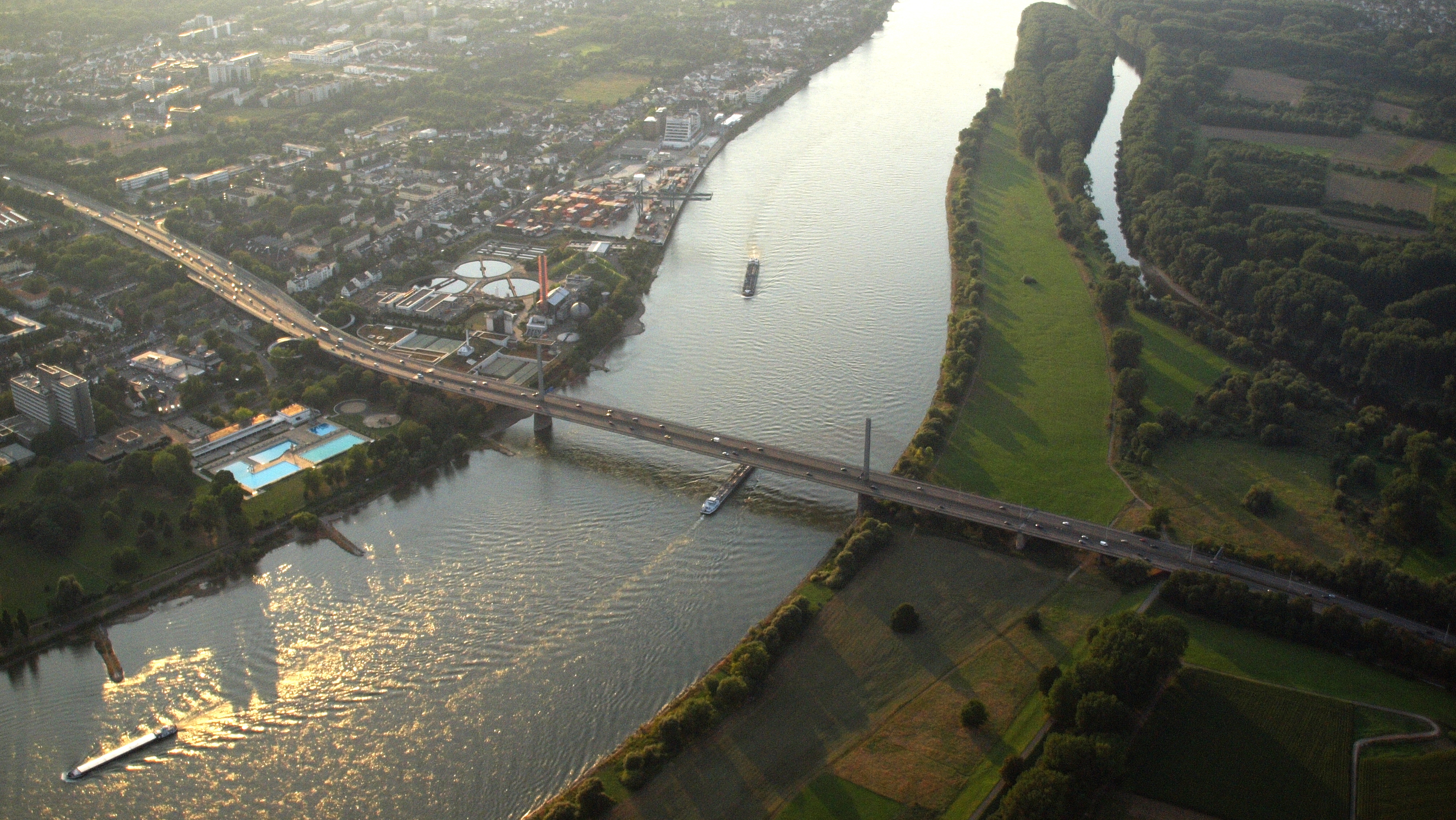 Friedrich-Ebert-Brücke, Bonn: Luftaufnahme aus südöstlicher Richtung